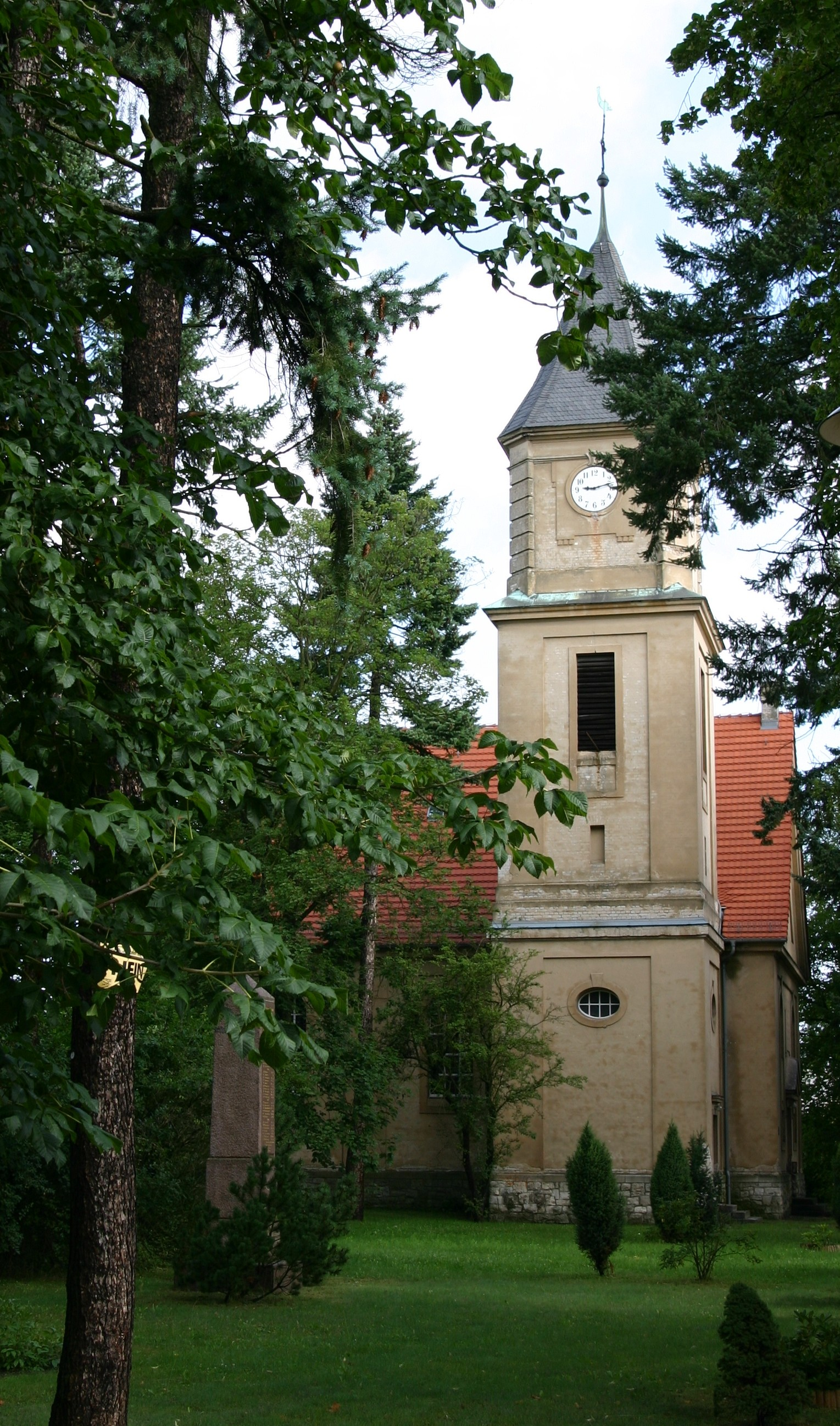 Dorfkirche von Gosen, Deutschland.